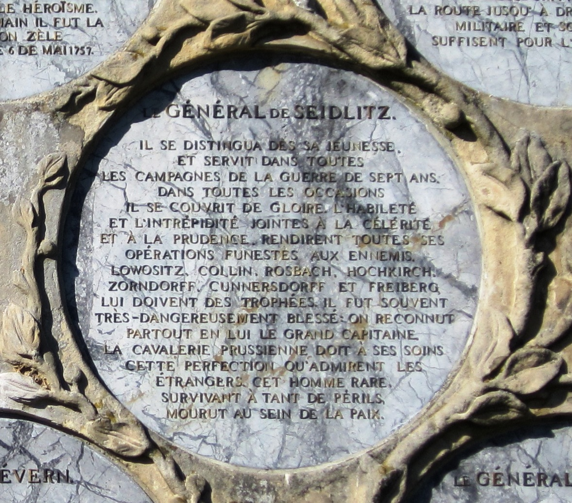 Ehrentafel für Friedrich Wilhelm von Seydlitz (1721–1773) am Obelisken in Rheinsberg